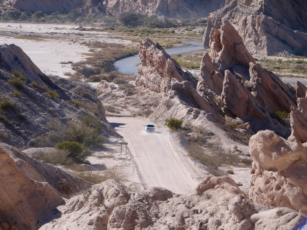 Argentina. Ruta Nacional 40. Quebrada de las Flechas. Salta